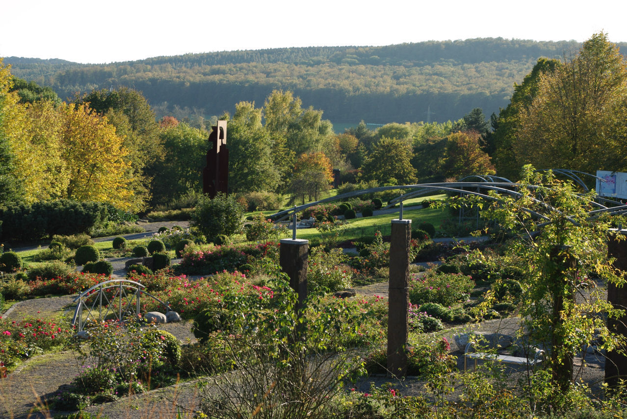 Rosengarten in Bad Emstal Sand mit Blick in Richtung Kurpark